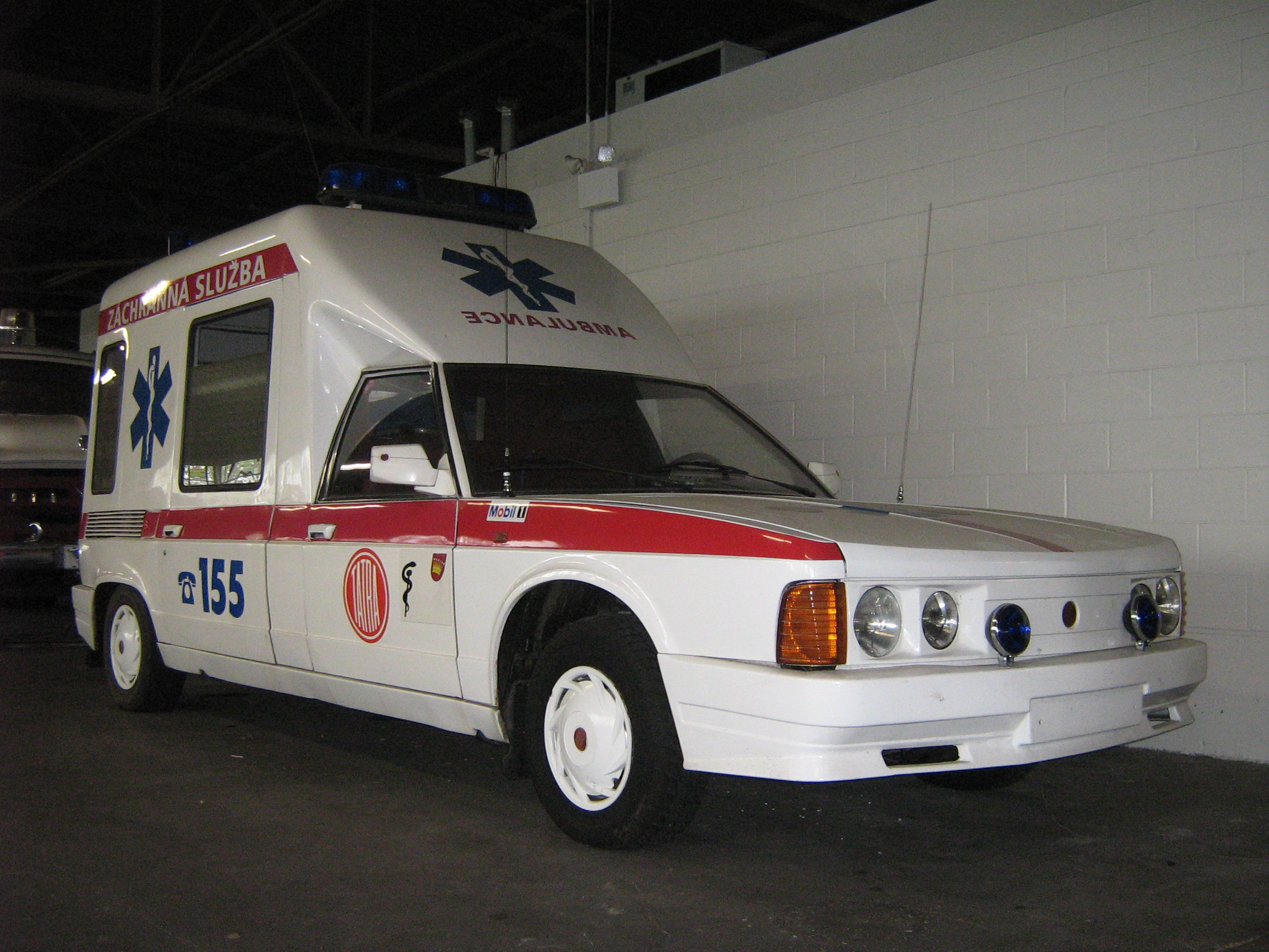 1980 Tatra T-613 Ambulance